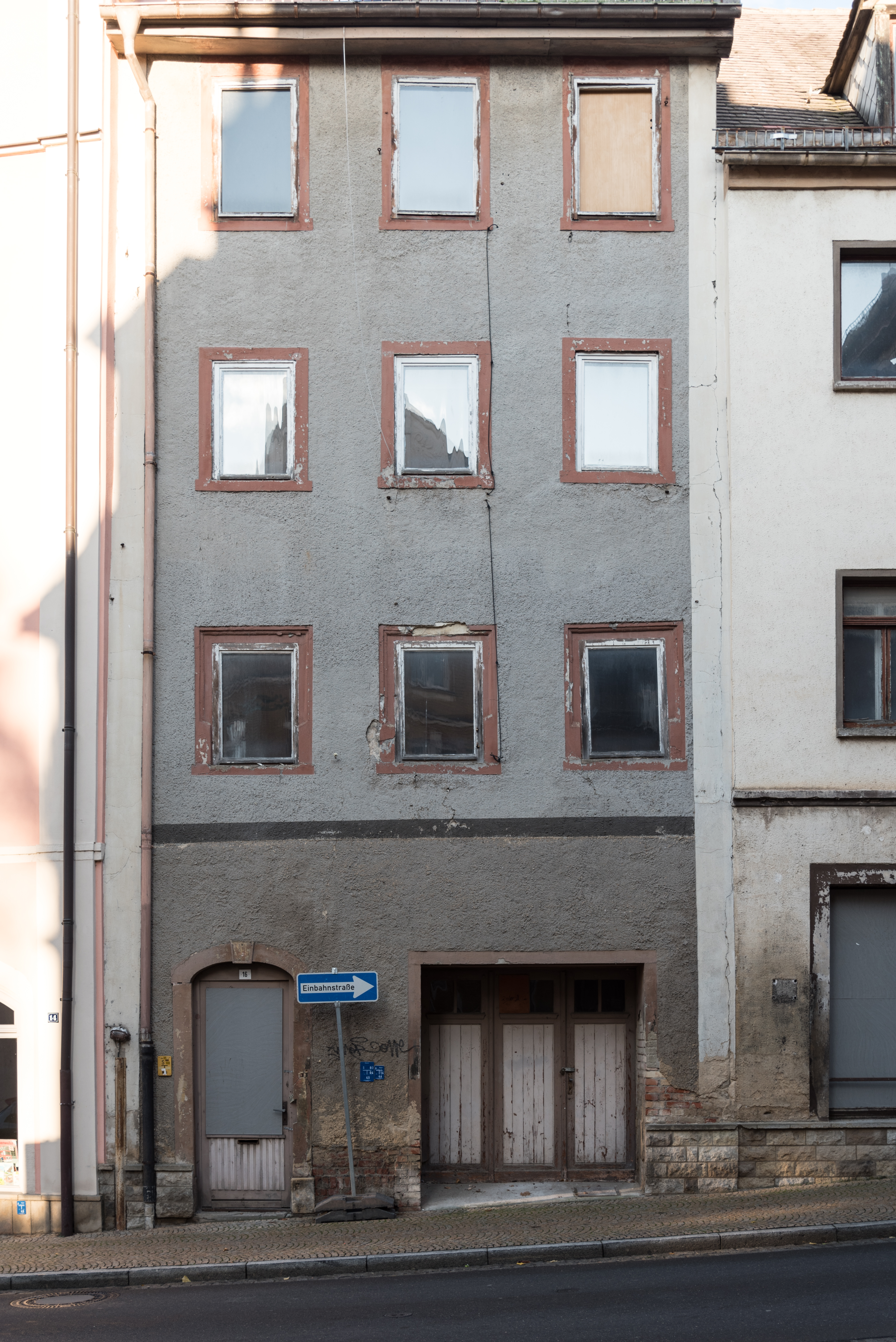 Weißenfels, Große Burggasse 16